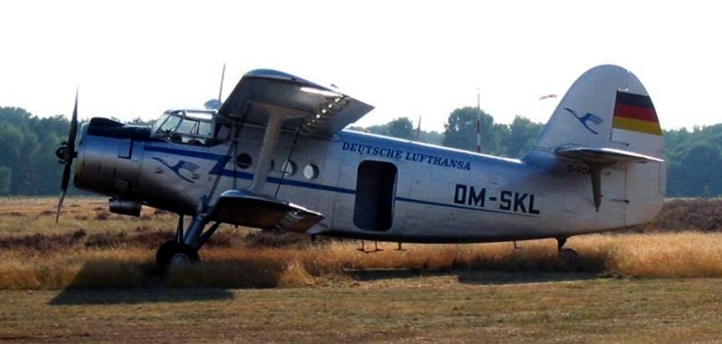 Antonov An-2 auf dem Flugplatz Windelsbleiche, Bielefeld mit Beschriftung der Ostdeutschen-Lufthansa , später Interflug Aufnahmedatum: 23.08.2003